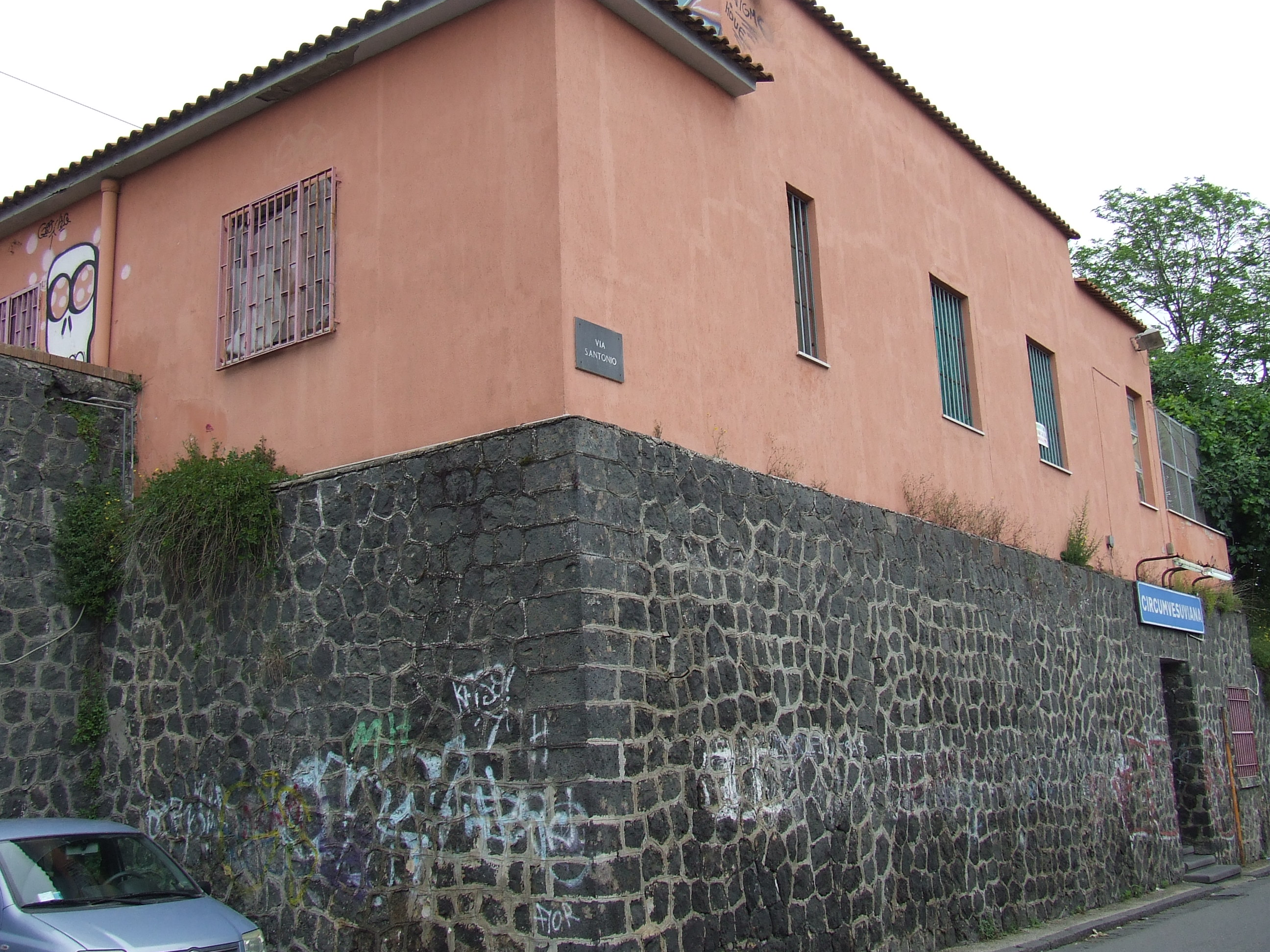 Stazione Via Sant'Antonio, linea Napoli - Pompei, Circumvesuviana, EAV - esterno